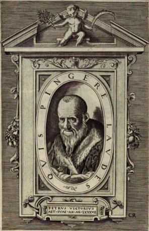 De generatione et corruptione, 1521, Aristoteles, Pietro Alcionio